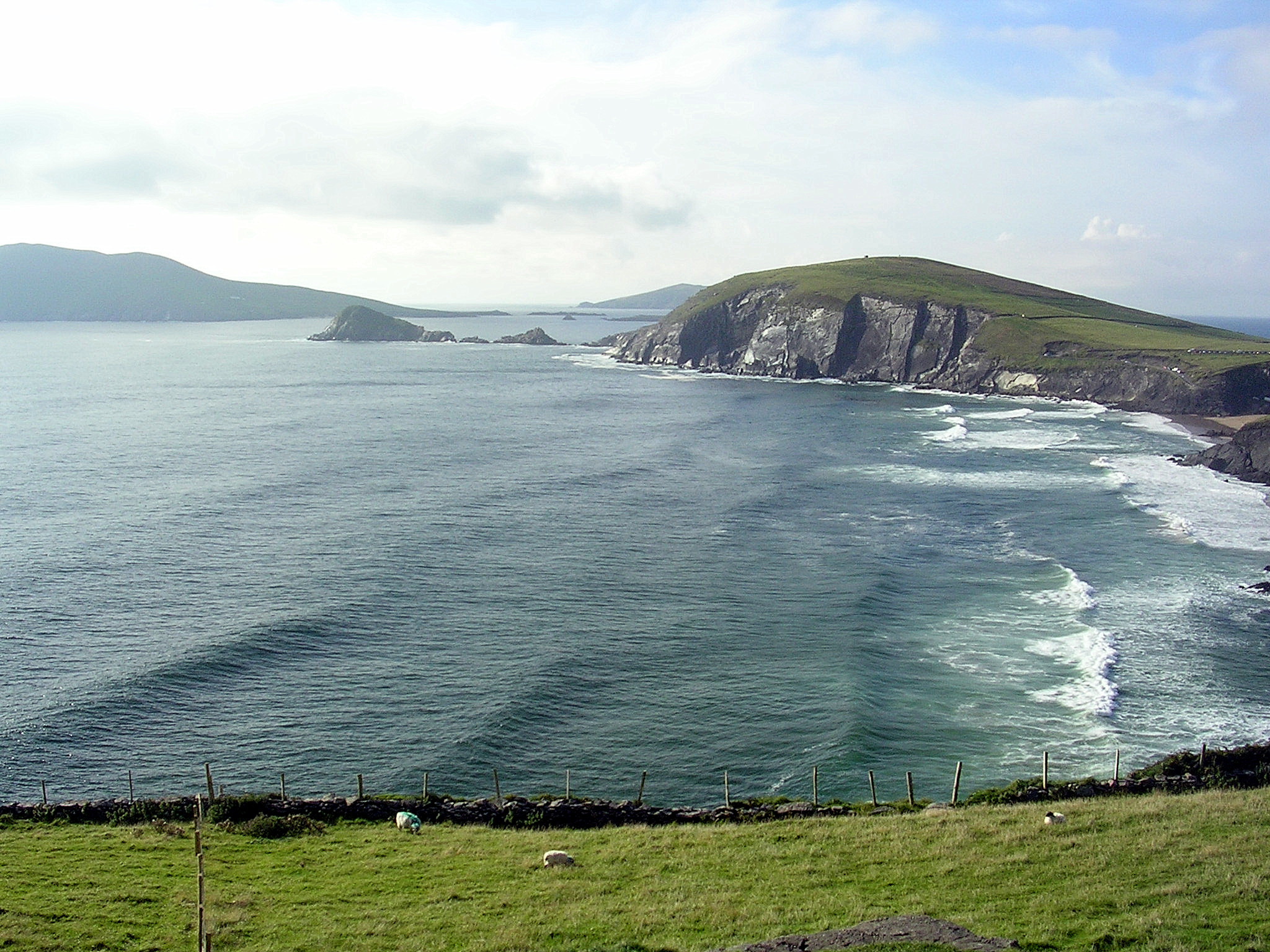 Péninsule de Dingle, Slea Head